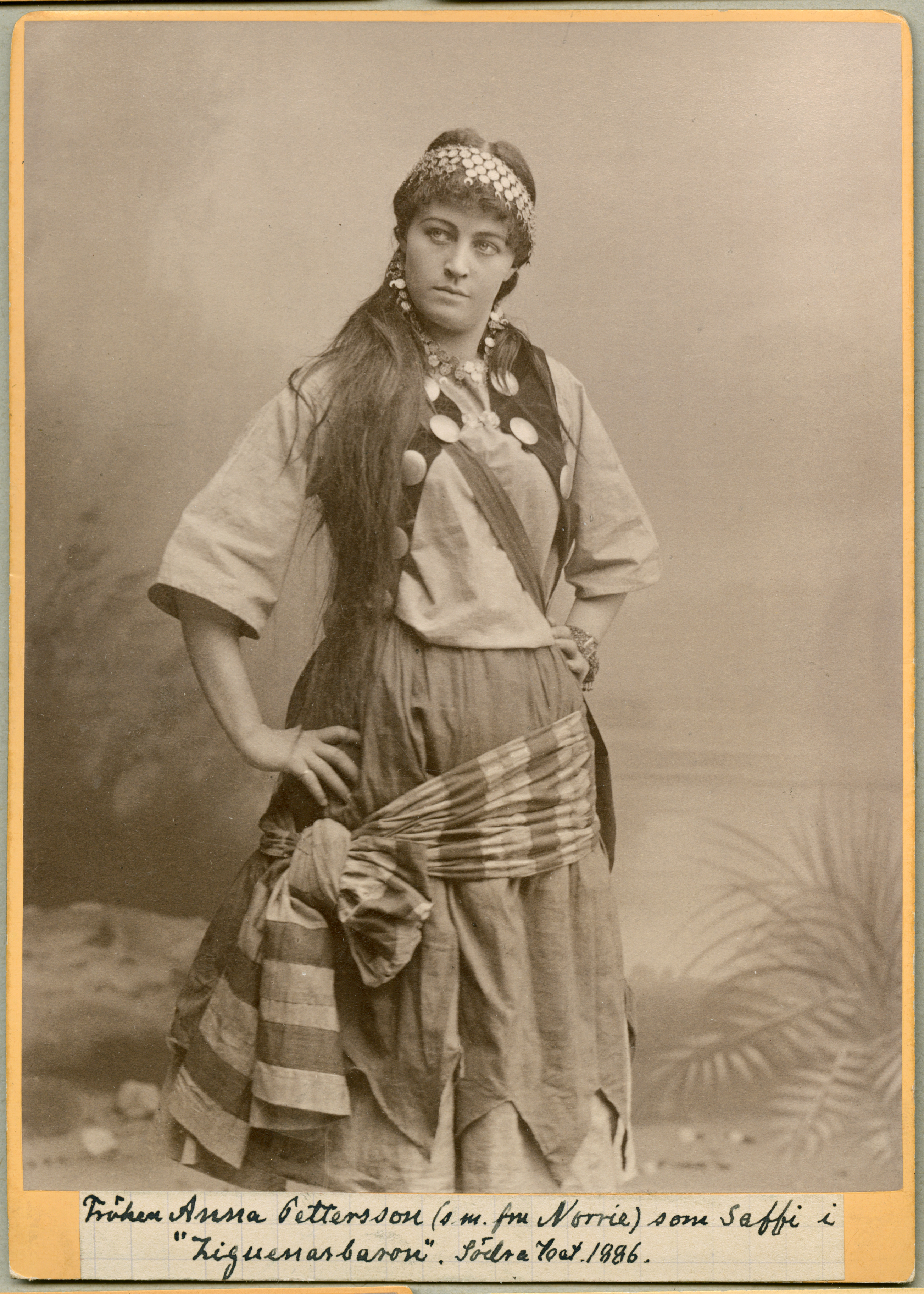 Anna Norrie (f. Pettersson) som Saffi i Zigenarbaronen, Södra teatern